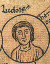 Liudolf of Lotharingia